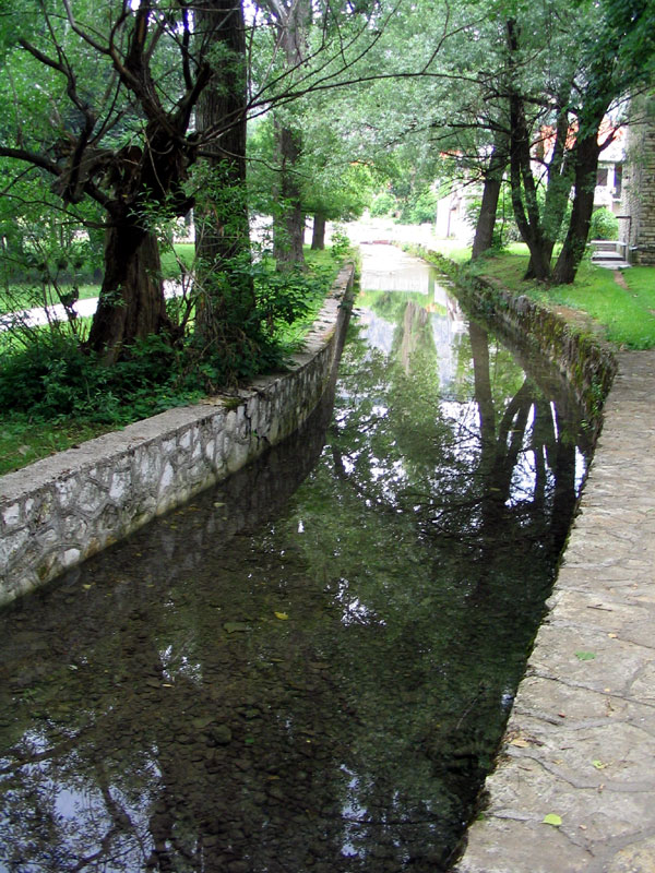 Livno, Bosna i Hercegovina, rijeka Bistrica